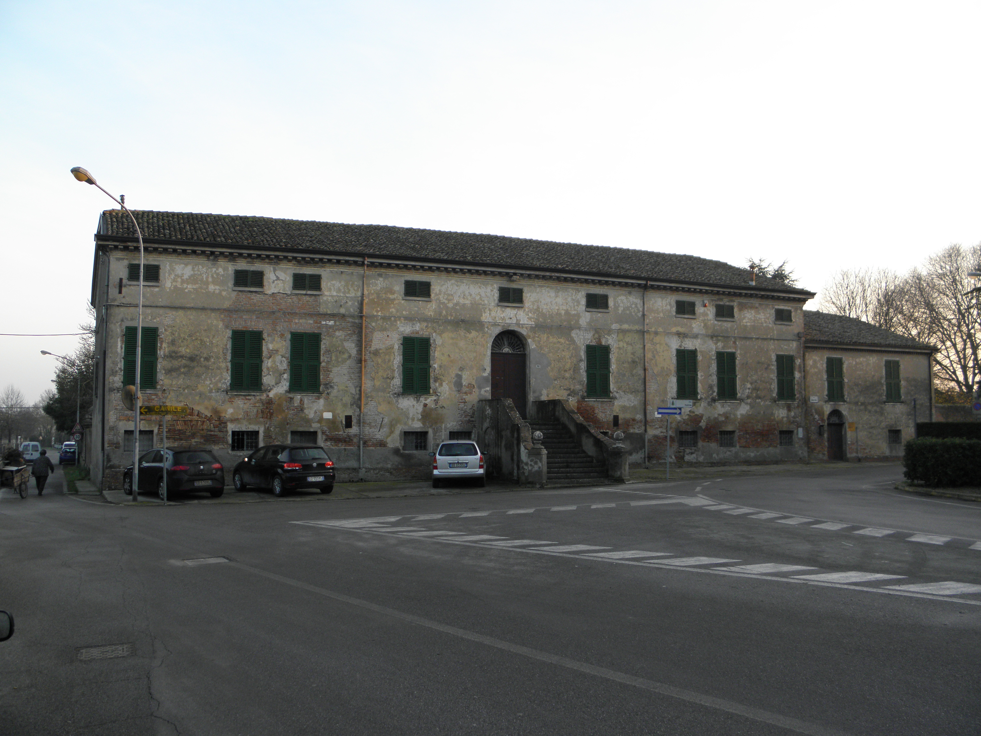 Migliaro, già comune autonomo e dal 2014 frazione di Fiscaglia: Palazzo Boccaccini (XVII-XIX secolo).